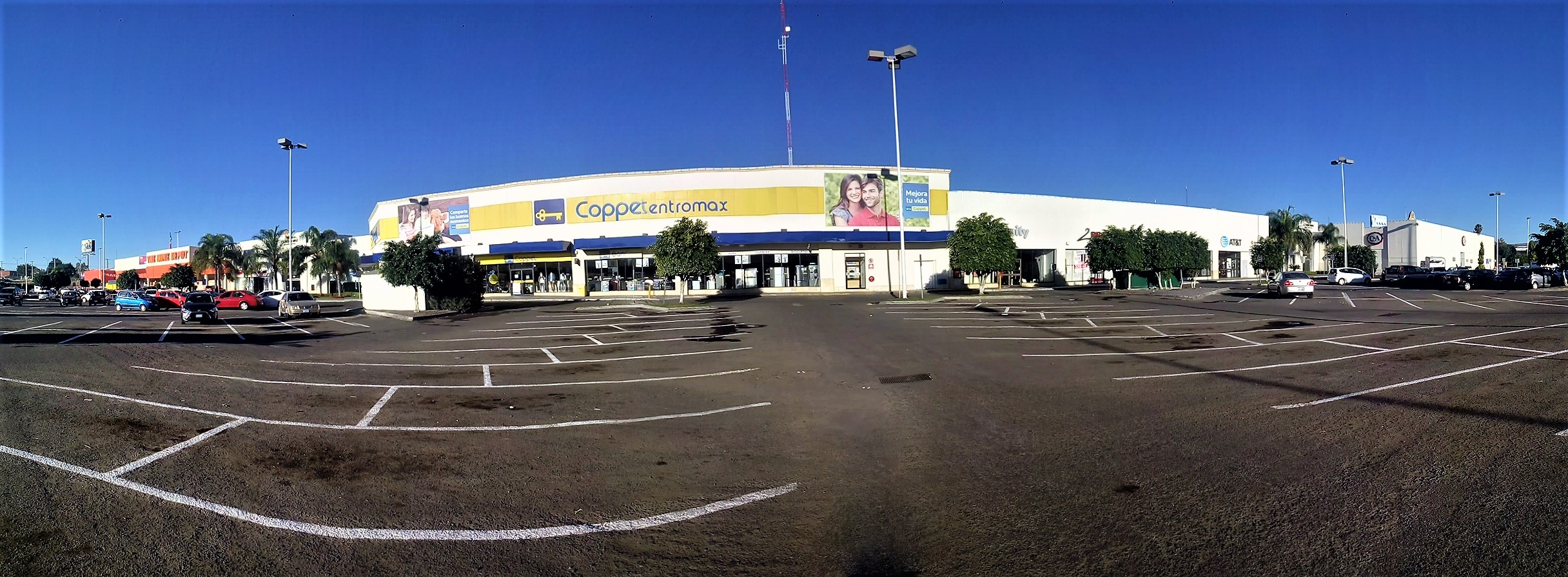 Centro Max.